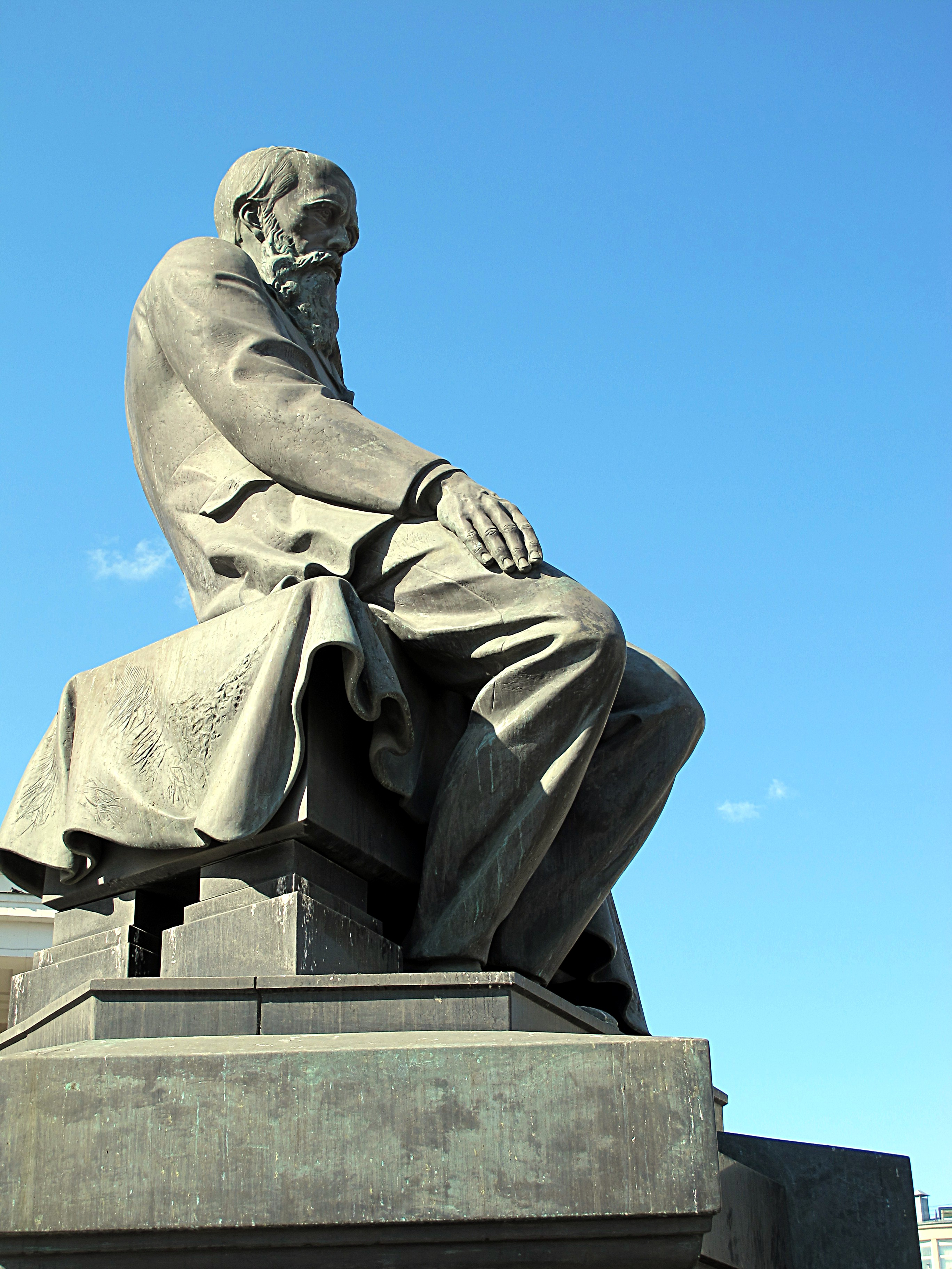 Памятник Фёдору Михайловичу Достоевскому